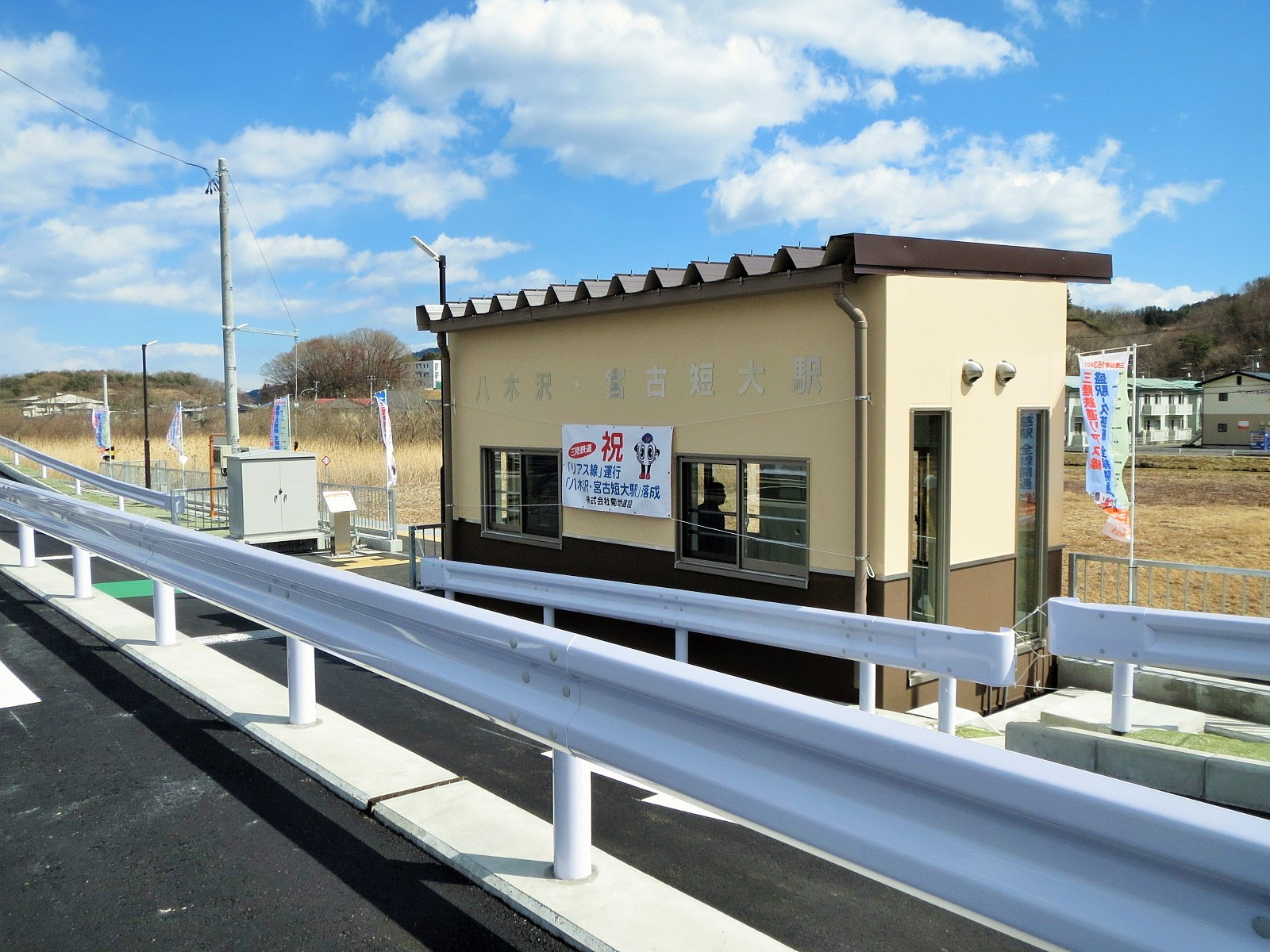 宮古市にある八木沢・宮古短大駅 Canon IXY 3